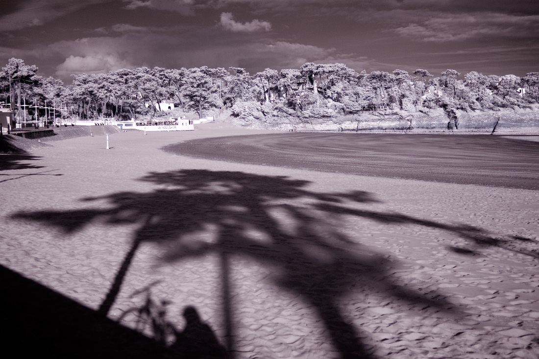 Conche de Nauzan à marée basse, photographie infrarouge sur capteur numérique CMOS, objectif de 20mm